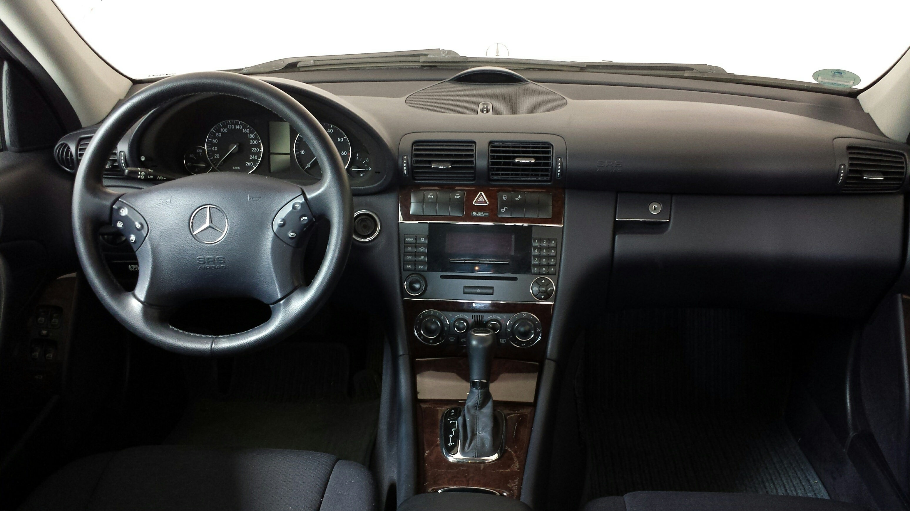 Elegance